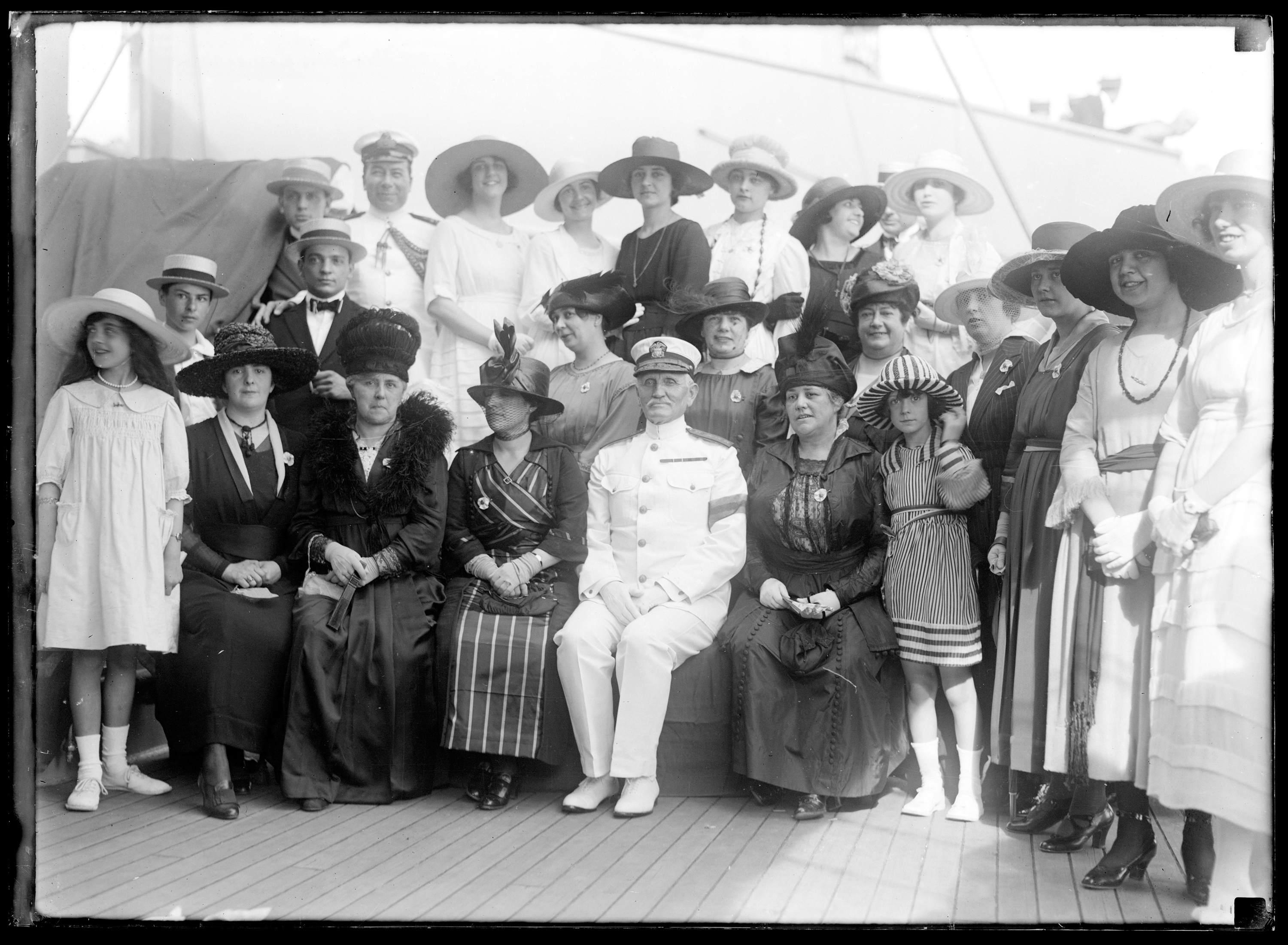 Recibimiento al Almirante William Caperton (al centro) durante su arribo al puerto de Montevideo.